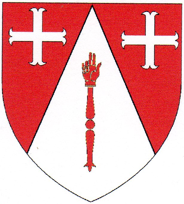 Coats of arm of Baron and Jonkheren van Dievoet (Belgium, Leuven), belgian nobility. Description : "D'argent à une main de justice de gueules, le champ chapé du même, à deux croix ancrées du premier. Heaume: d'argent couronné. Lambrequins : d'argent et de gueules. Cimier: une croix de l'écu. Devise : Houd voet bij stuk, d'argent sur un listel de gueules. En outre, pour le baron Josse-Emile van Dievoet, Couronne de baron, et comme supports : deux lions d'or, armés et lampassés de gueules".